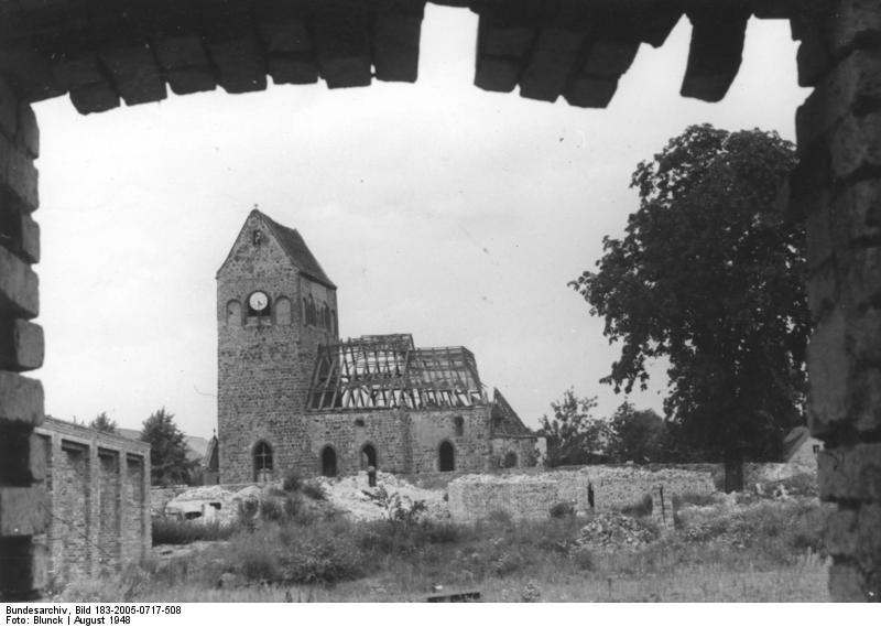 In Hönow, am Rande Berlin's, entsteht eine Neubauernsiedlung (Befehl 209). UBz: Die Hönower Kirche und die Reste des alten Schlosses. Von den Steinen des Schlosses werden Neubauernhäuser gebaut, während die Kirche aus dem 12. Jahrhundert unter Denkmalschutz steht und im Rahmen des Aufbauplanes wieder restauriert wird. Aufn.: Illus-Blunck 1936-48 16.8.48